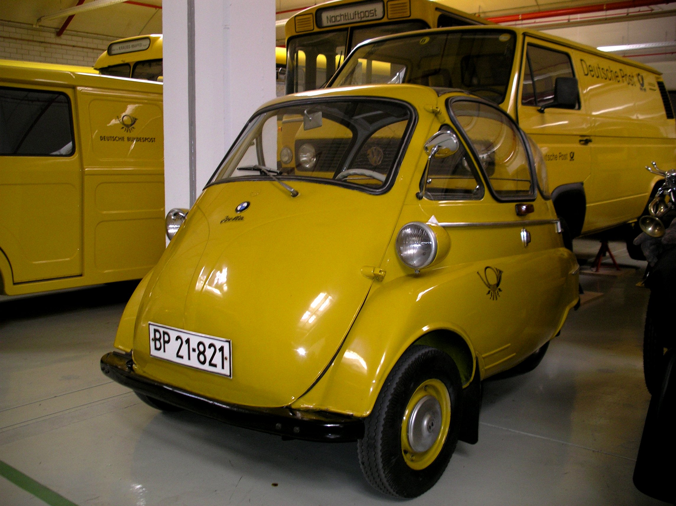 BMW Isetta der deutschen Post im Museum für Kommunikat​ion Frankfurt , Museumsdep​ot in Heusenstam​m